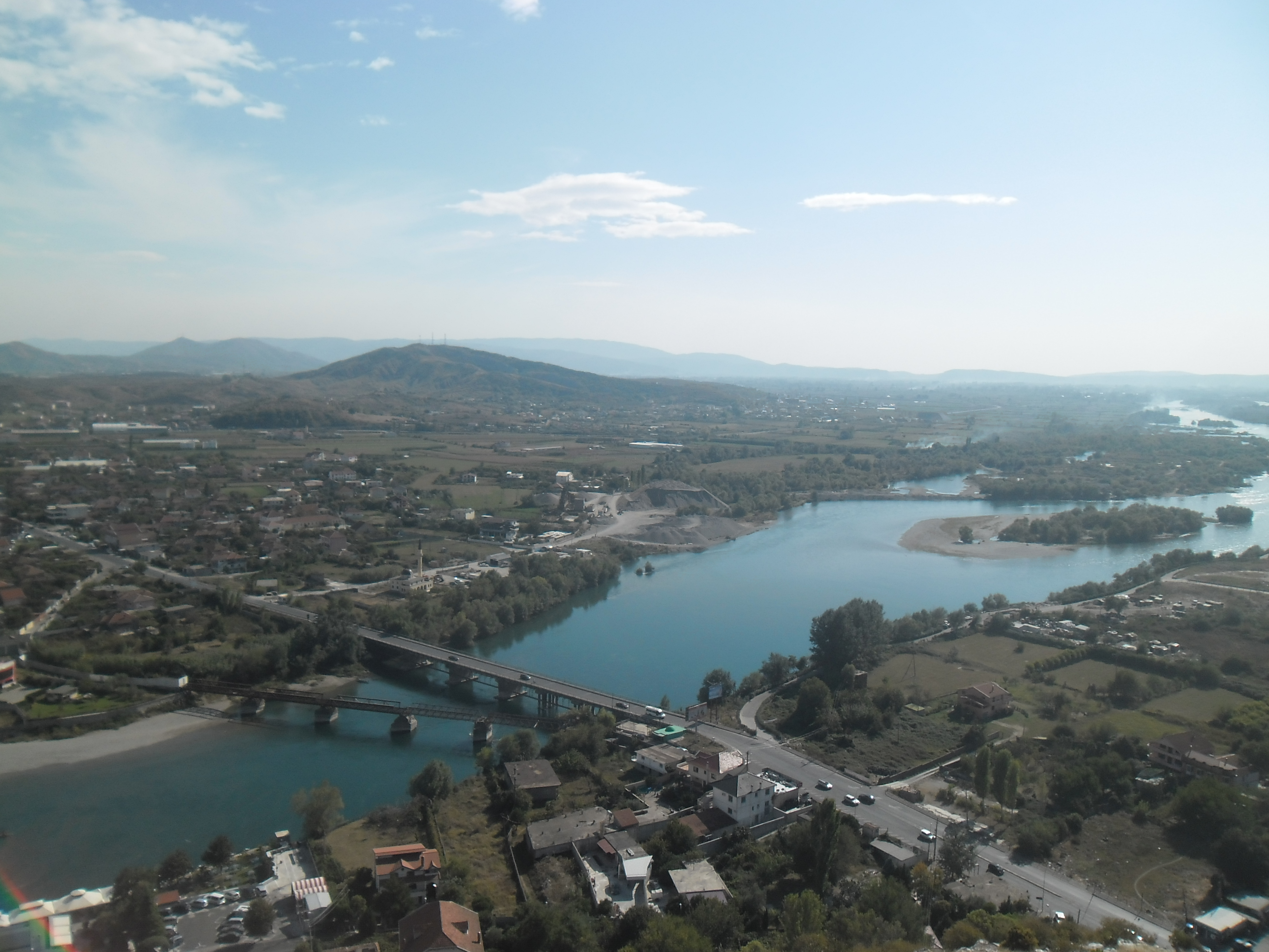 Shkodër